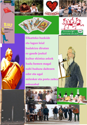 Diru laguntza bultzatzeko orria